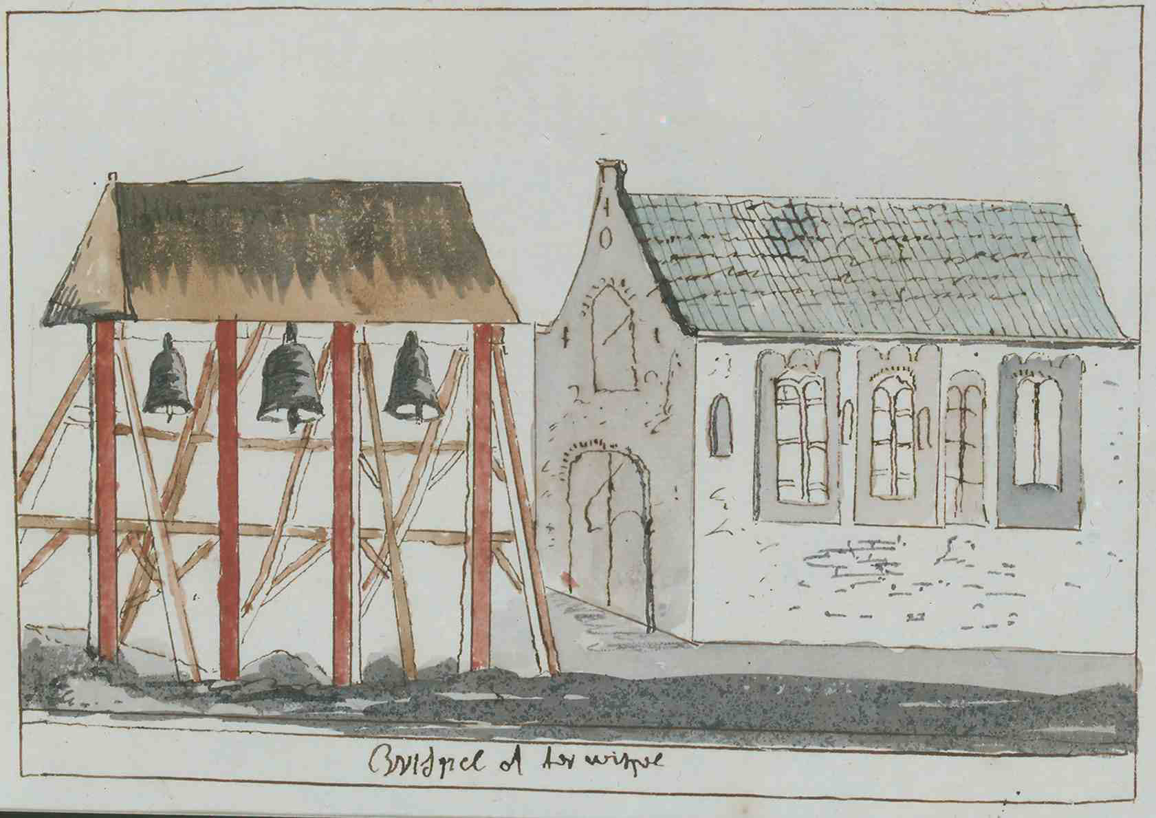 Korte Beschreijving van de Steden Dorpen Gehugten en Heeren-huizen der Heerlykheid Vriesland Benevens Desselfs Afbeeldingen Meest na 't leven getekent By een Vergaderdt Door Andries Schoemaker